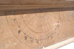 Ceasul solar - Napóra